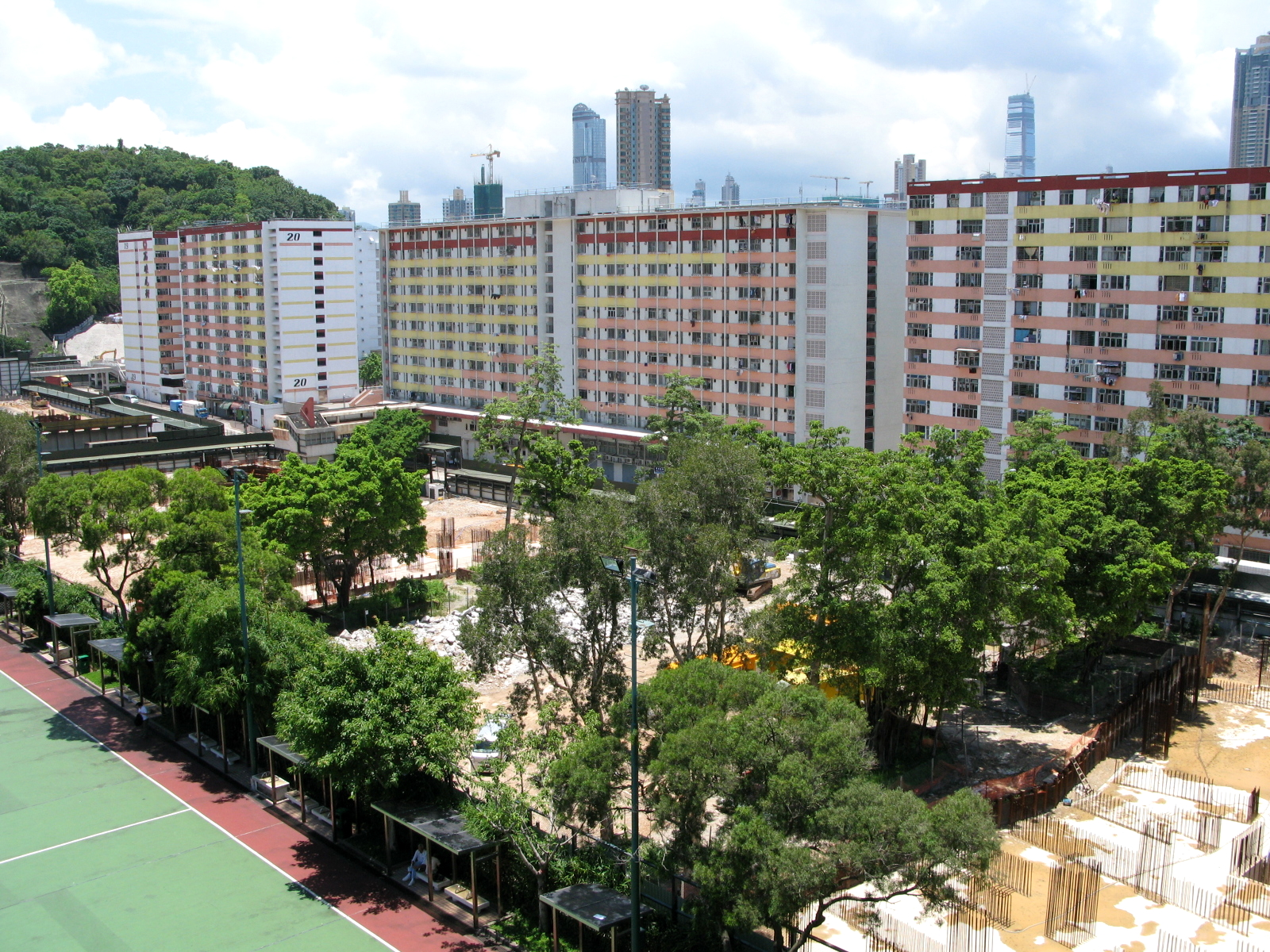 Shek Kip Mei Estate Block 20 & 23